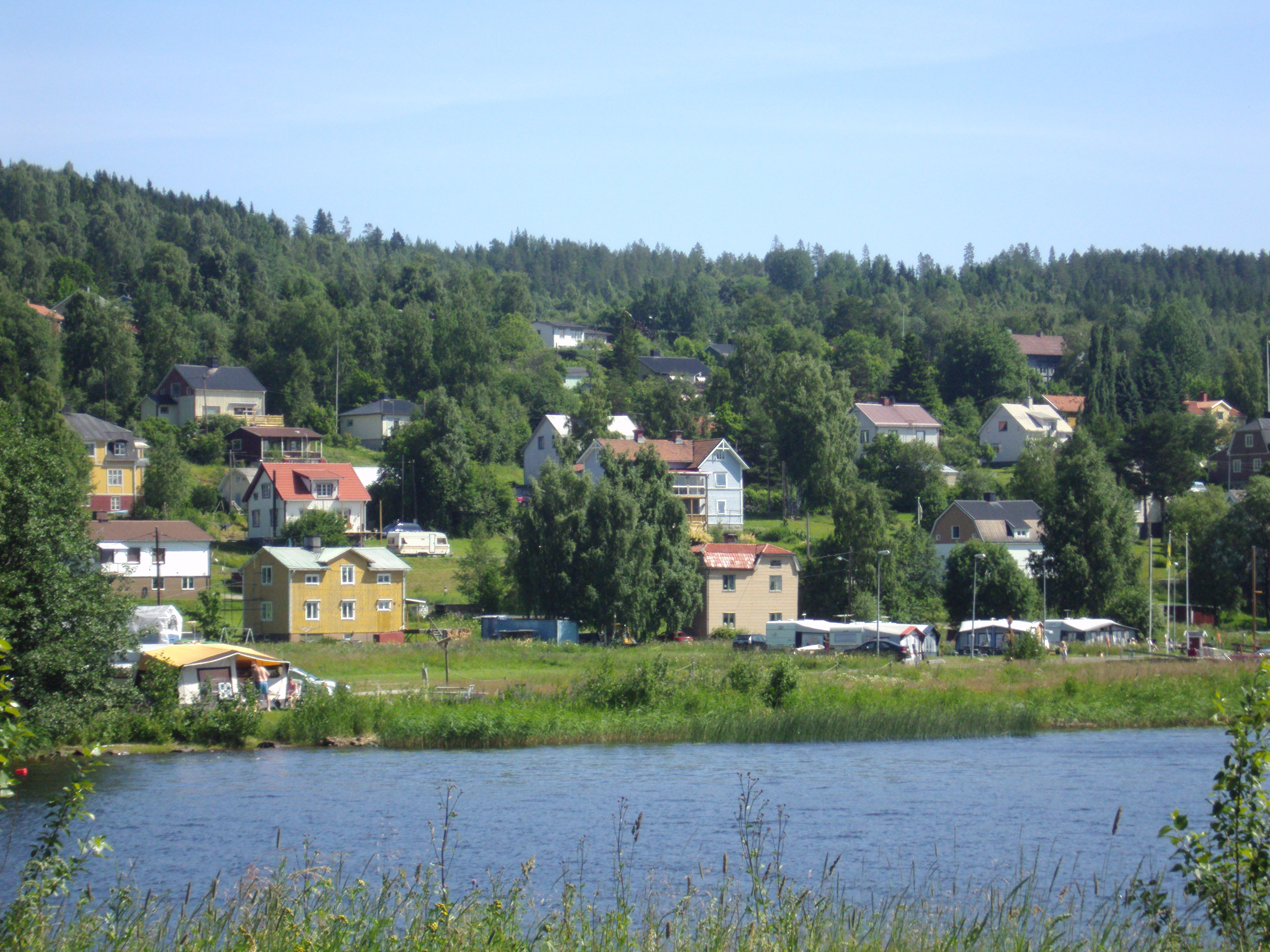 Klockestrand